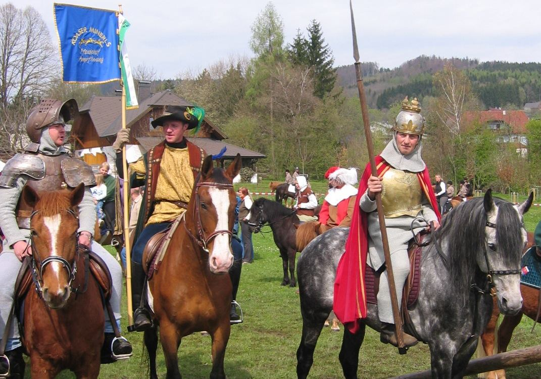 hl. Georg